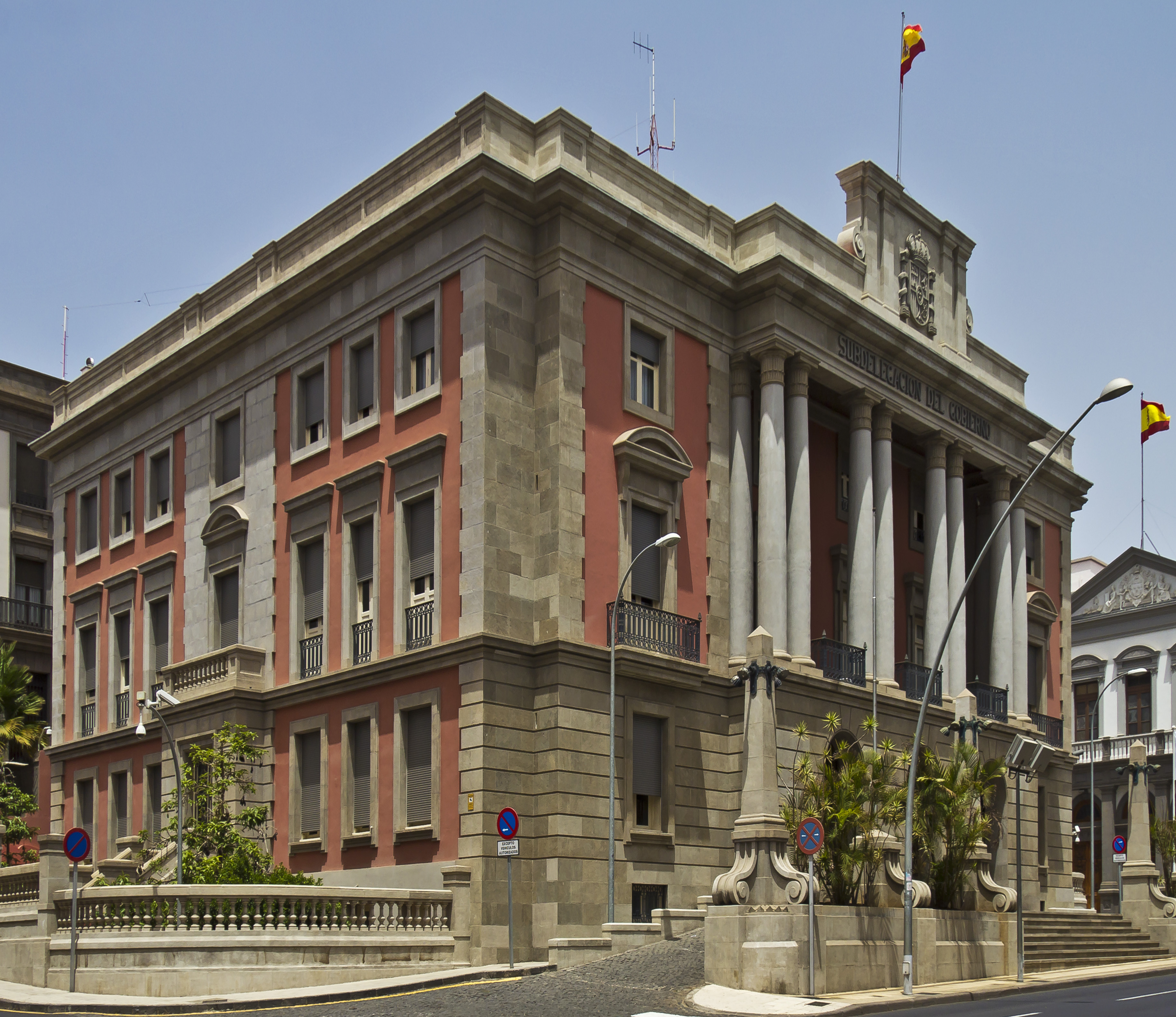 Das Gebäude der Subdelegación del Gobierno wurde im Jahr 1951 fertiggestellt. Der Architekt war Domingo Pisaca Burgada.